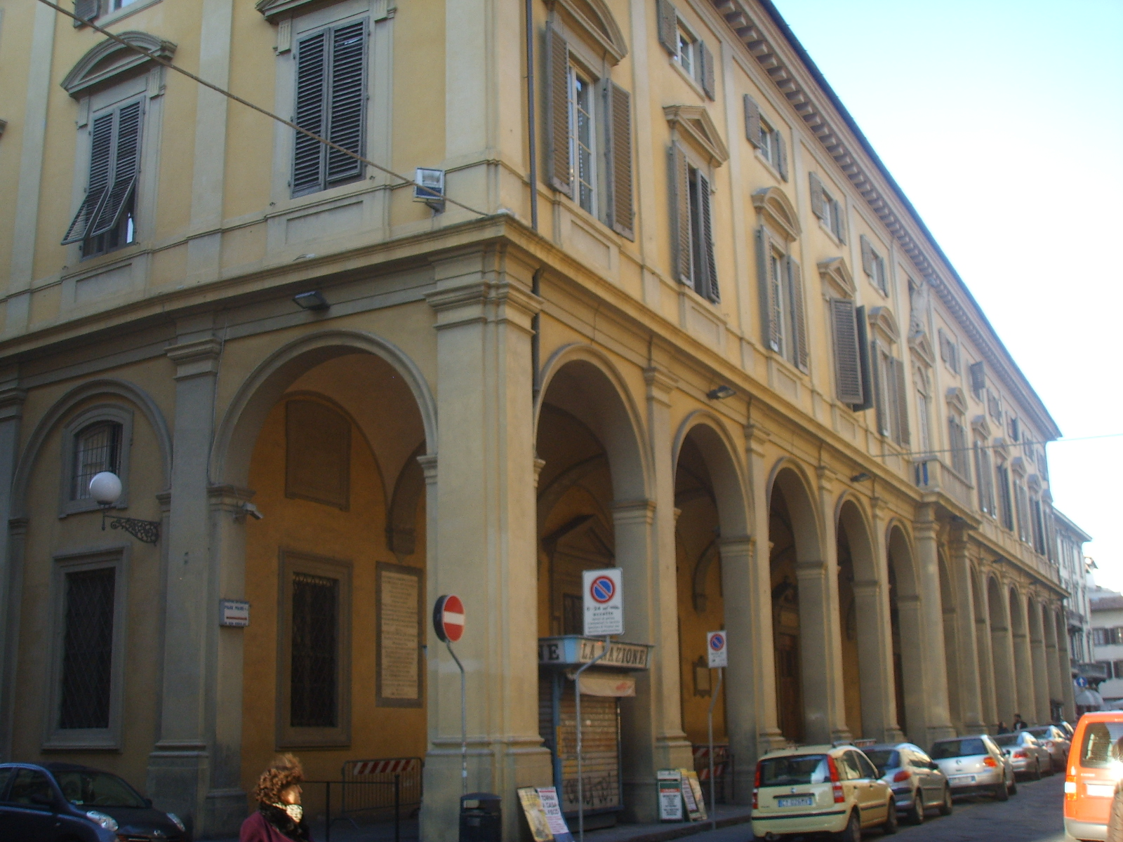 Ospedale_Bonifacio_Via_San_Gallo in Florence